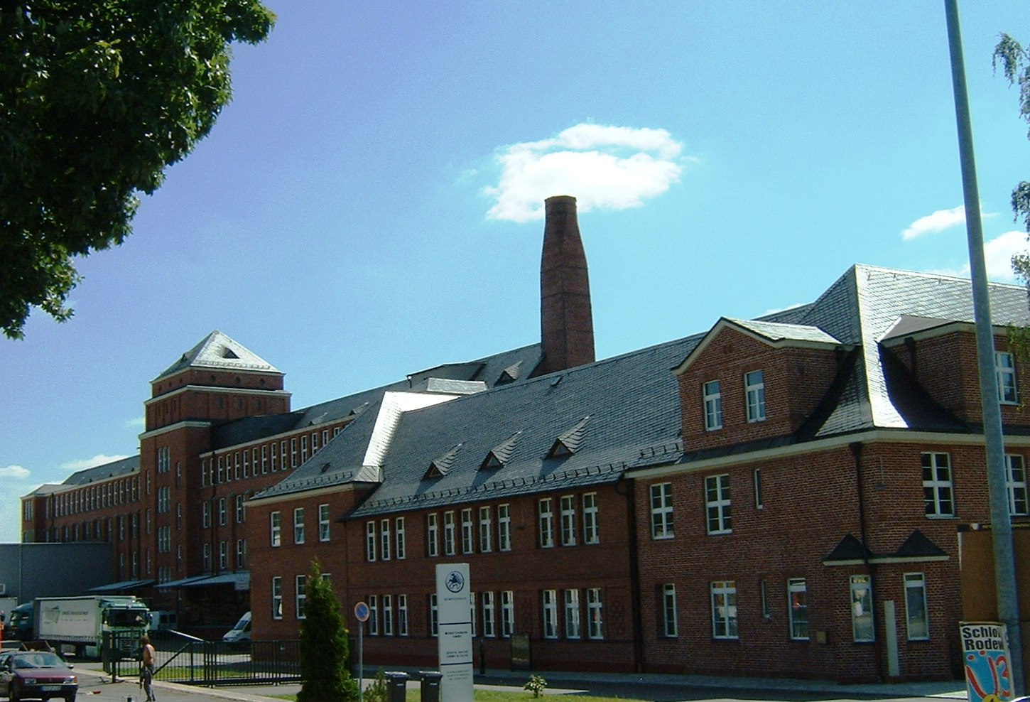 Stützengrün im Erzgebirge, Bürstenfabrik (denkmalgeschützt)